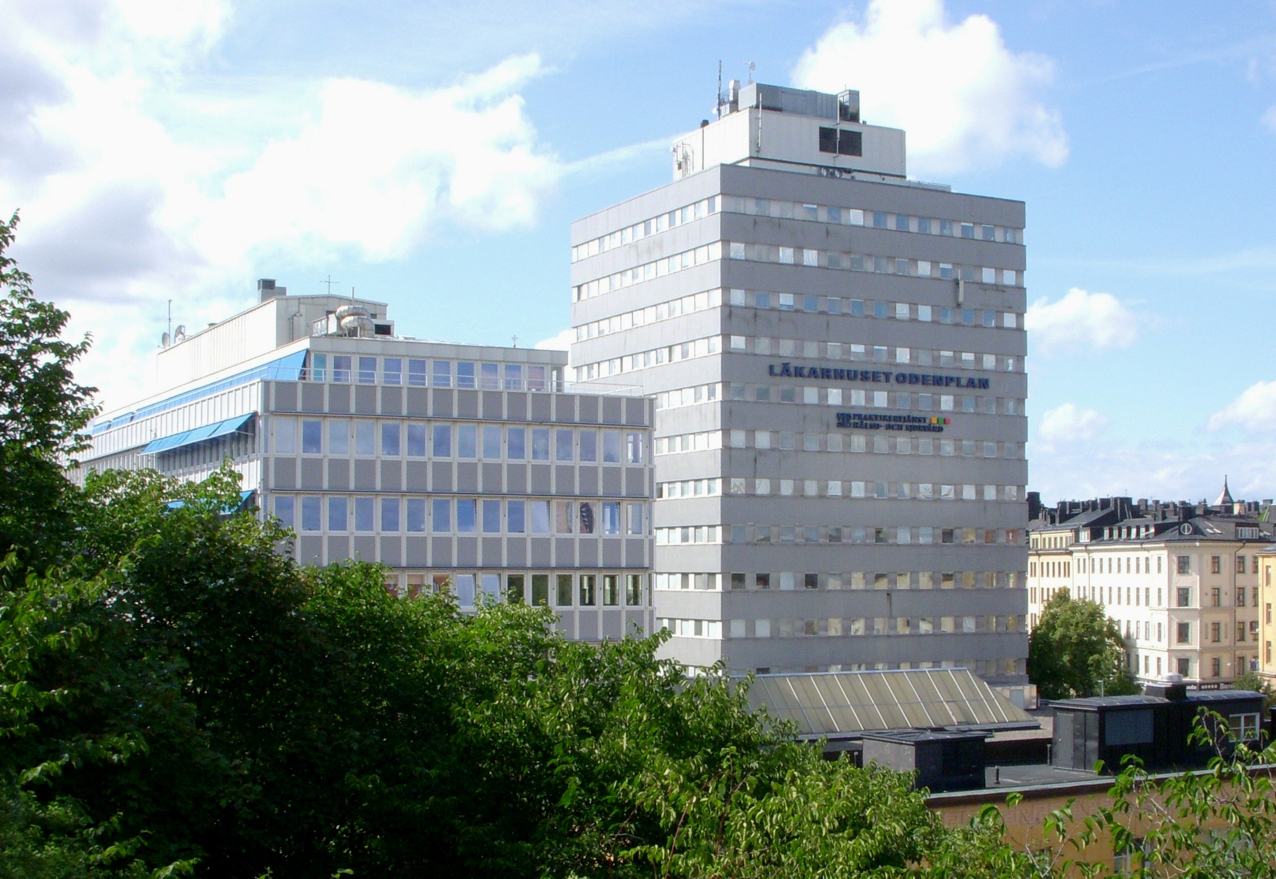 Läkerhuset Odenplan, Vasastan, arkitekter Ancker och Lindegren